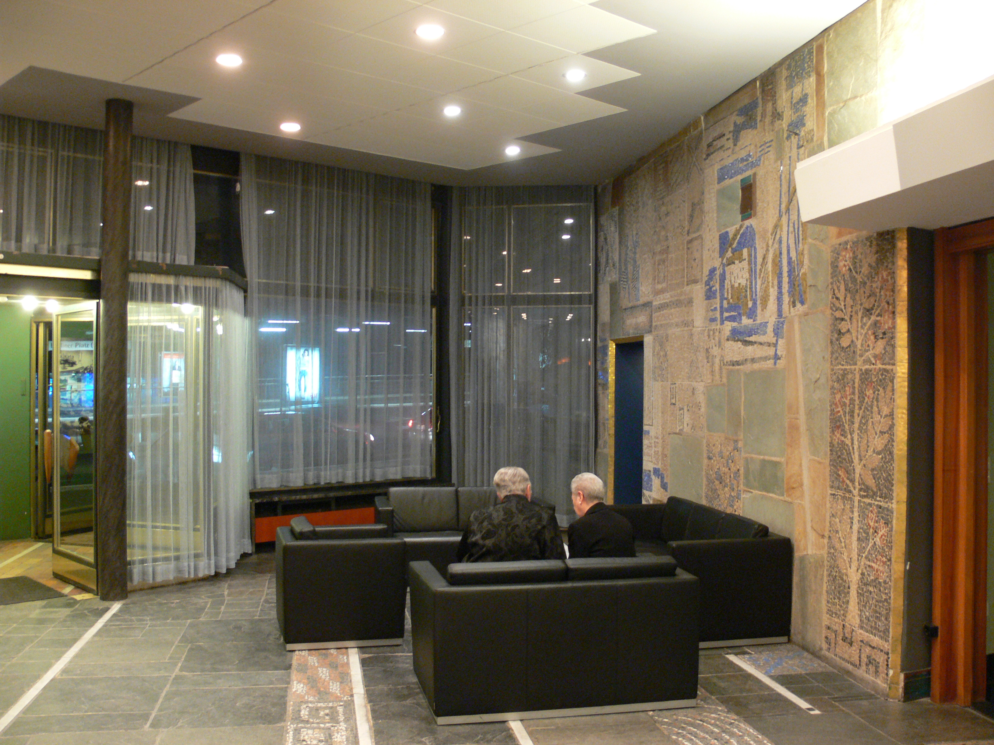 Liederhalle Stuttgart Foyer, Detail